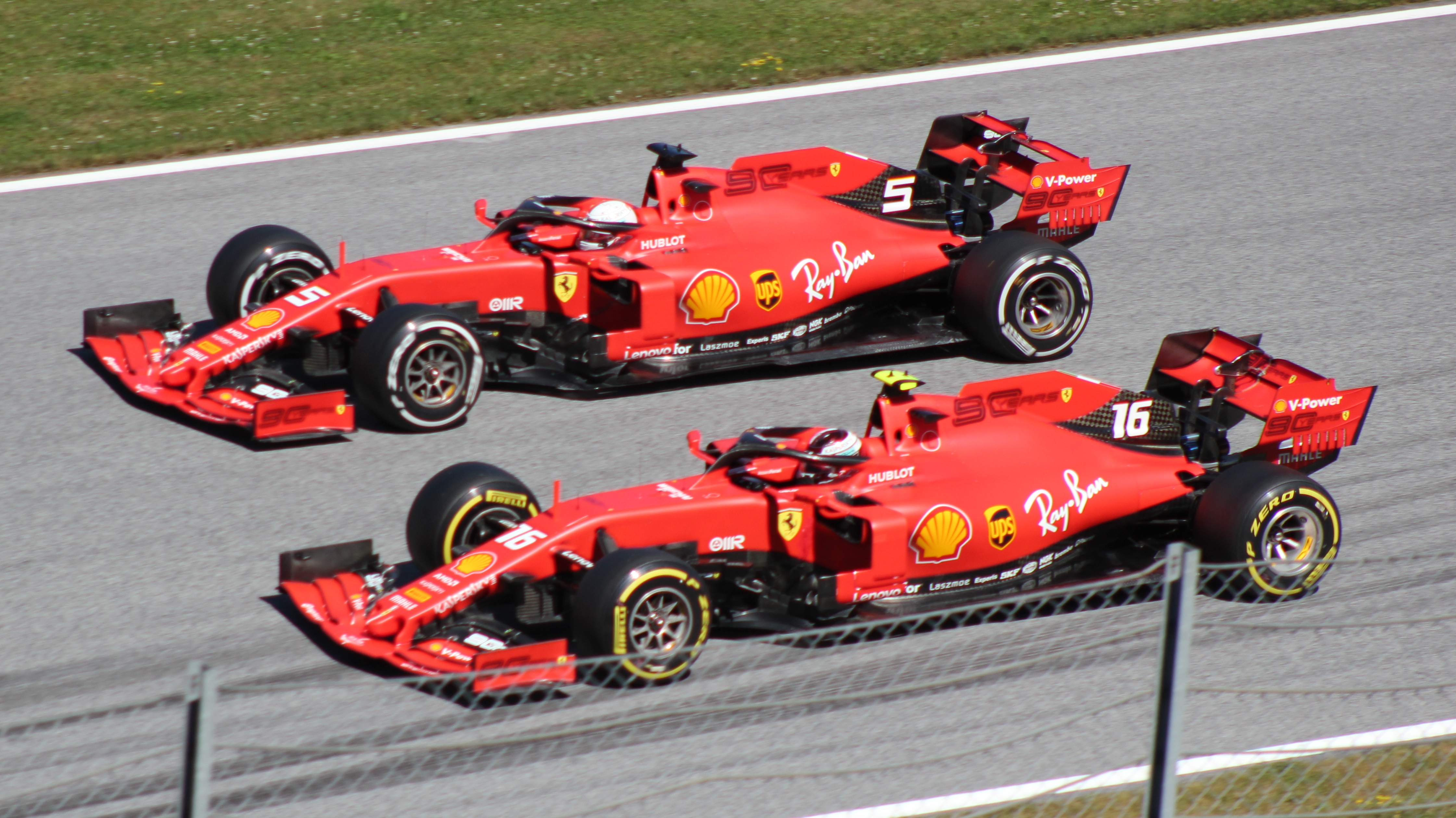 Leclerc und Vettel beim Rennwochenende in Österreich 2019